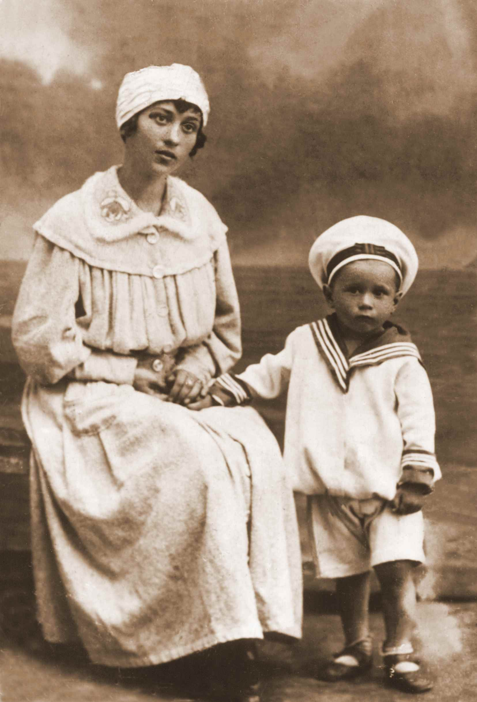 Володя Чоломій з мамою Ївгою Хомівною